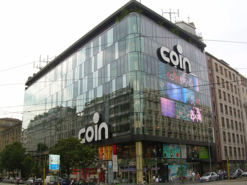 Grandi Magazzini Coin di Piazza V Giornate a Milano.